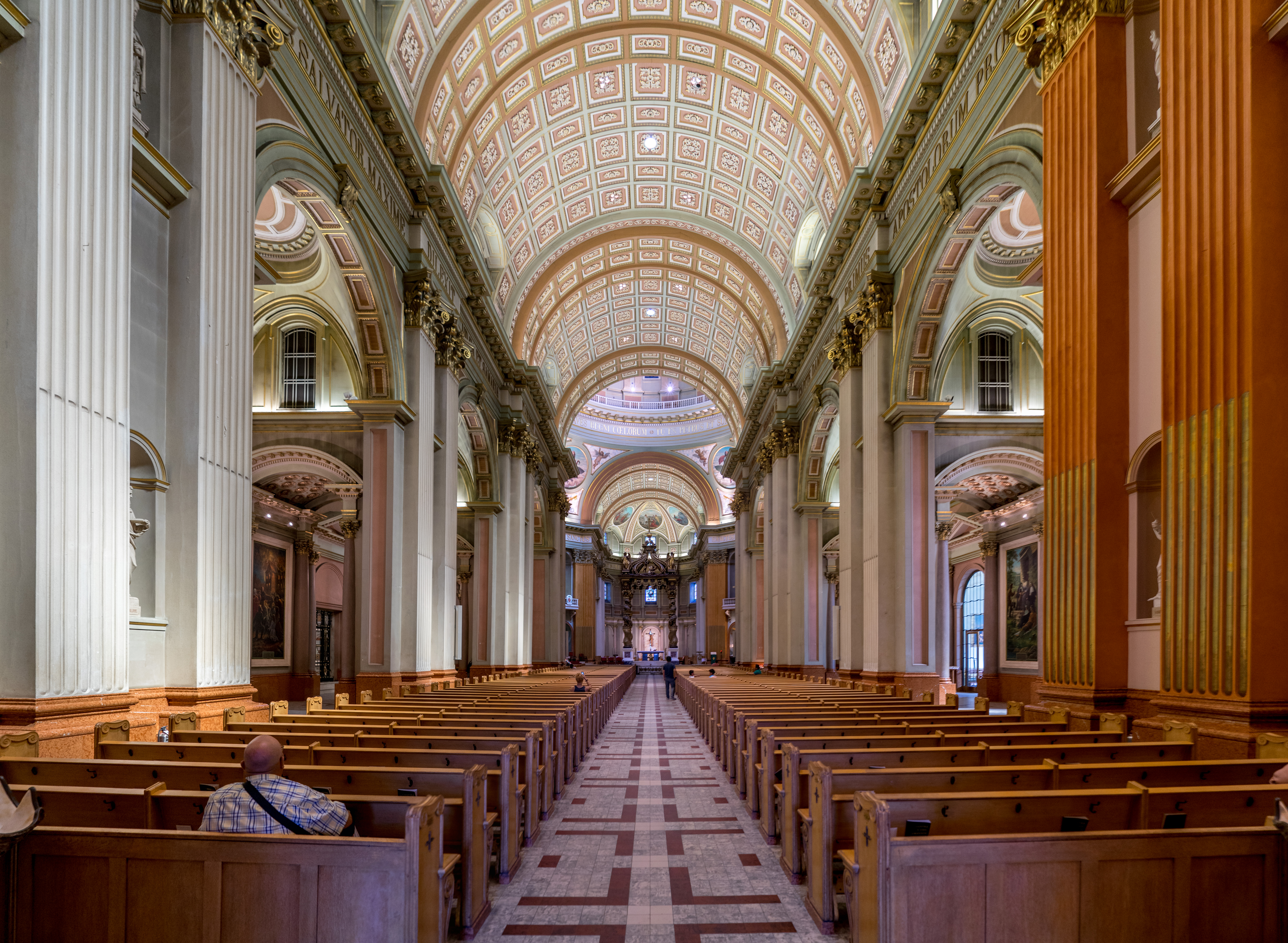 Marie-Reine-du-Monde, interior, Montréal